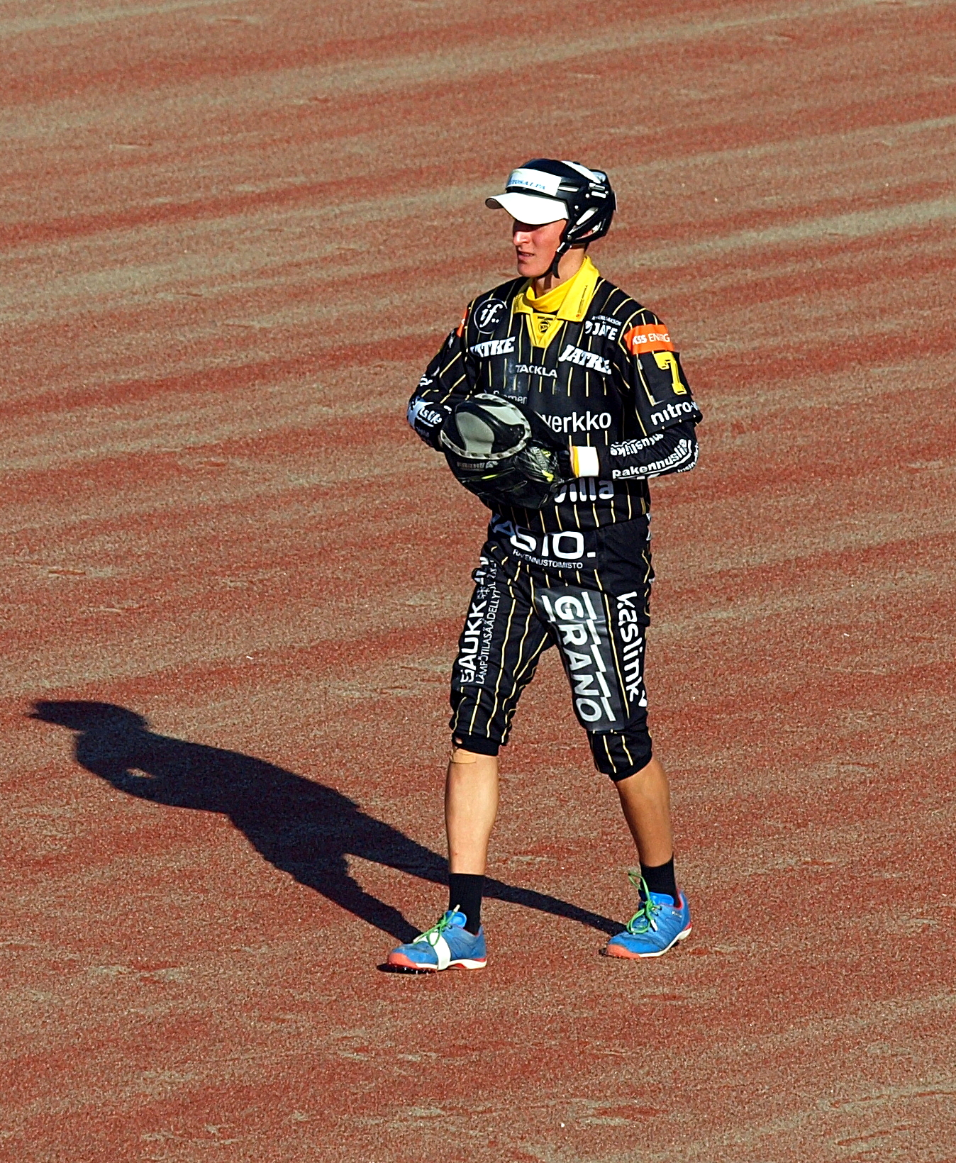 Vimpelin Veto - Kouvolan Pallonlyöjät pesäpallo-ottelu 5.8.2014. Kuvassa Konsta Hyötyläinen.